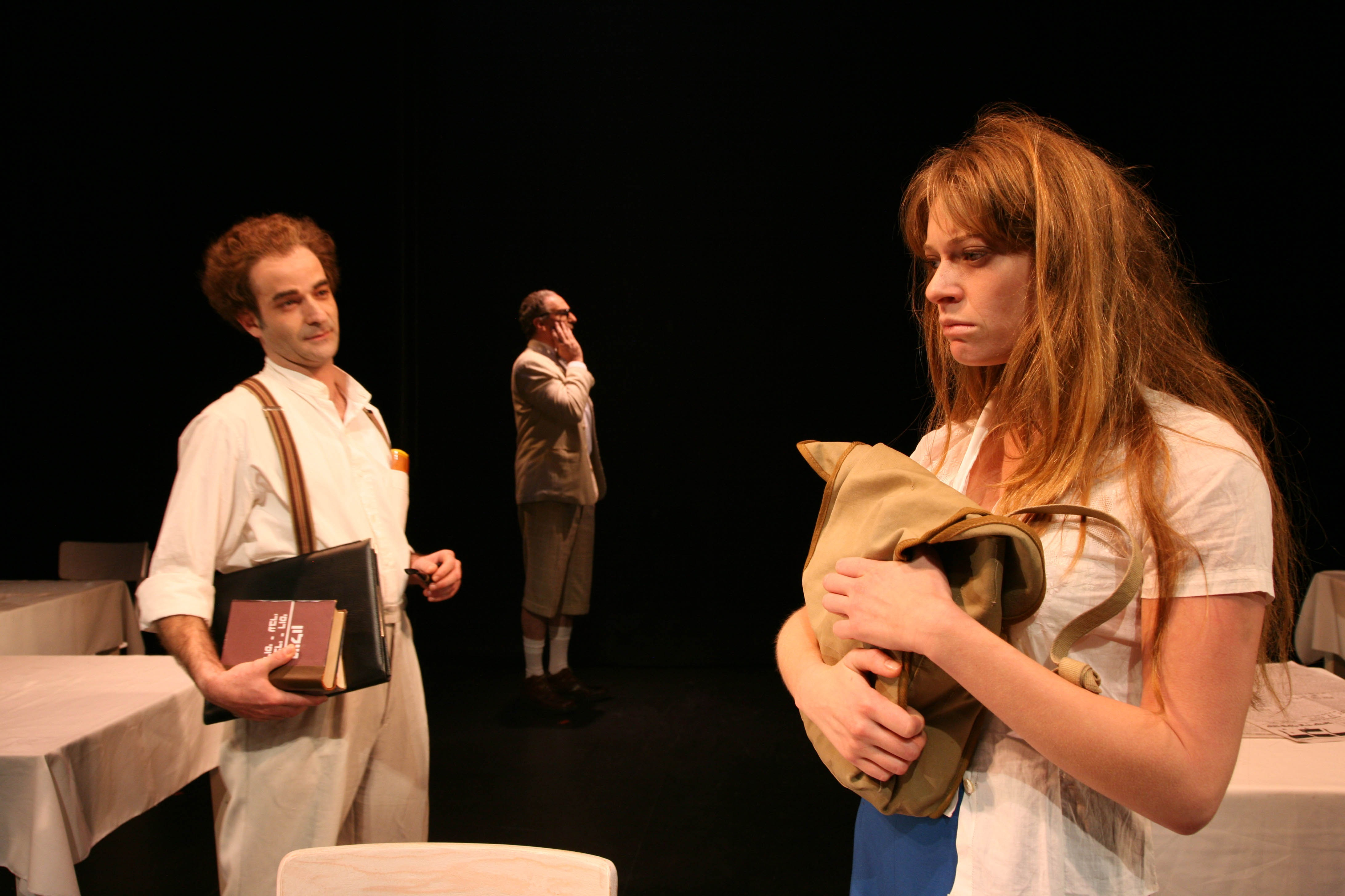 שירי גדני בהצגה היה או לא היה